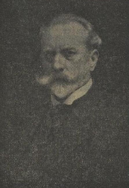 Vilém Trsek (1862-1937), český akademický malíř